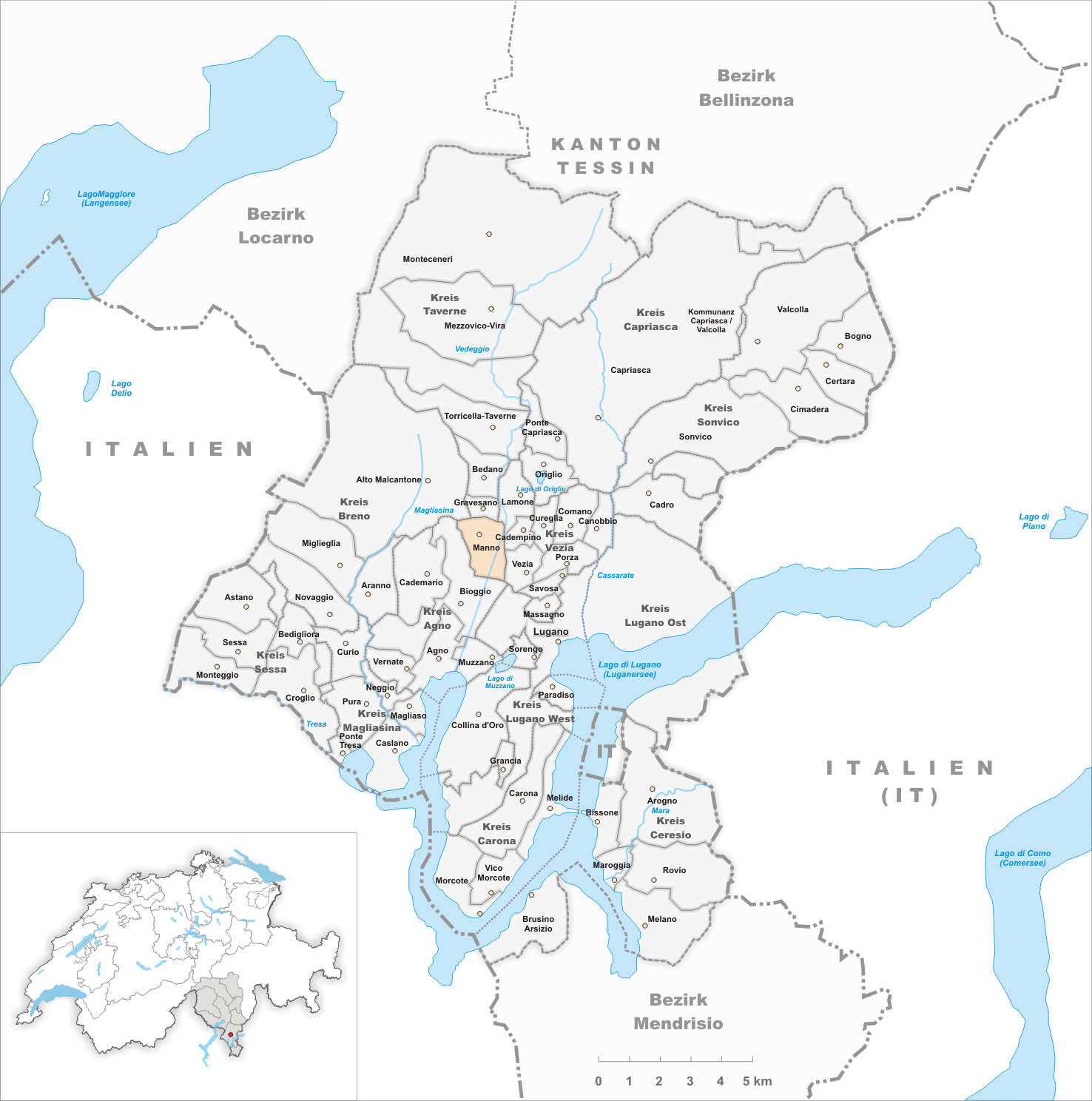 Municipality Manno